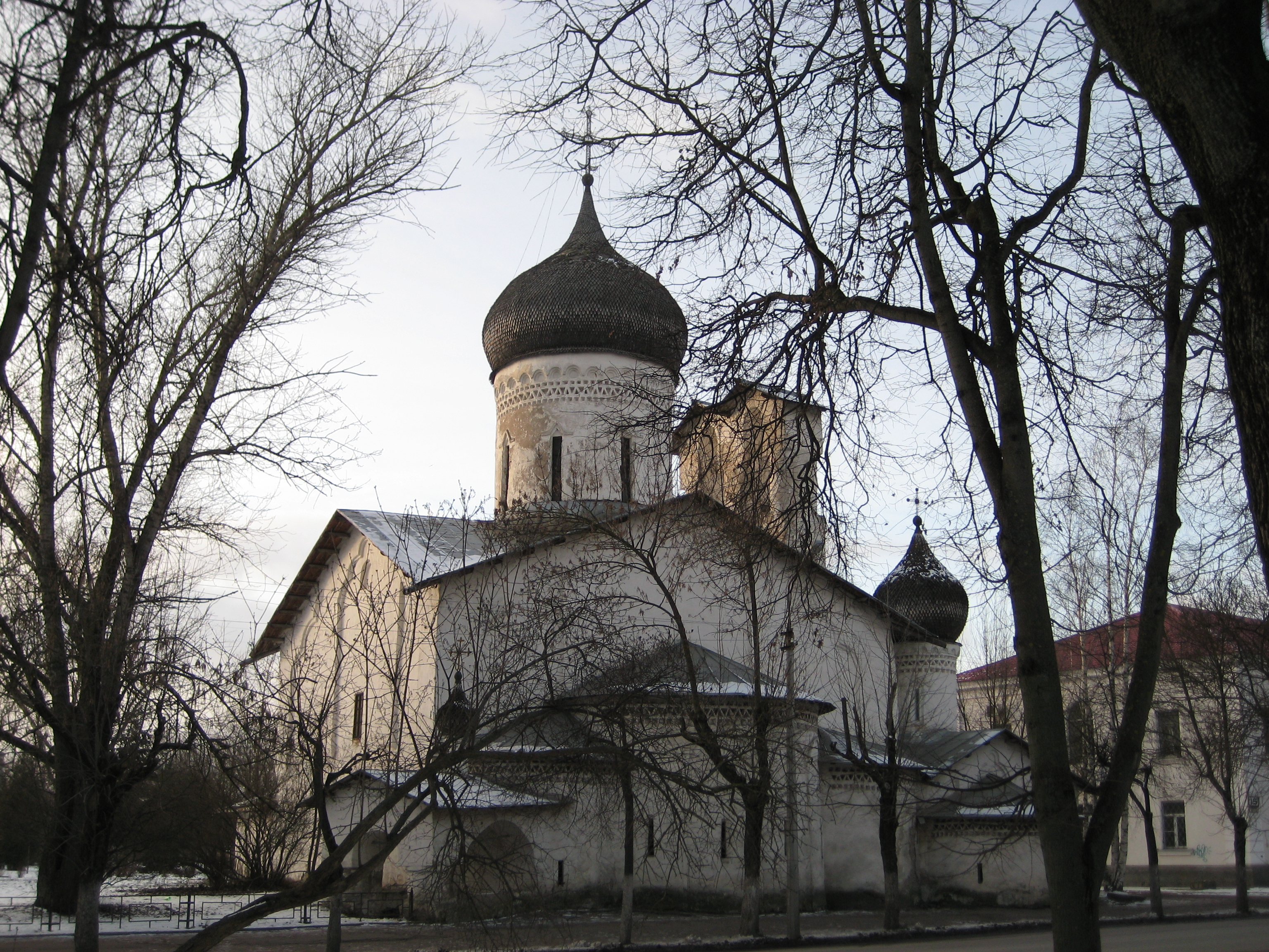 Церковь Николая Чудотворца на Усохе. Church of St. Nikolas at Usokha